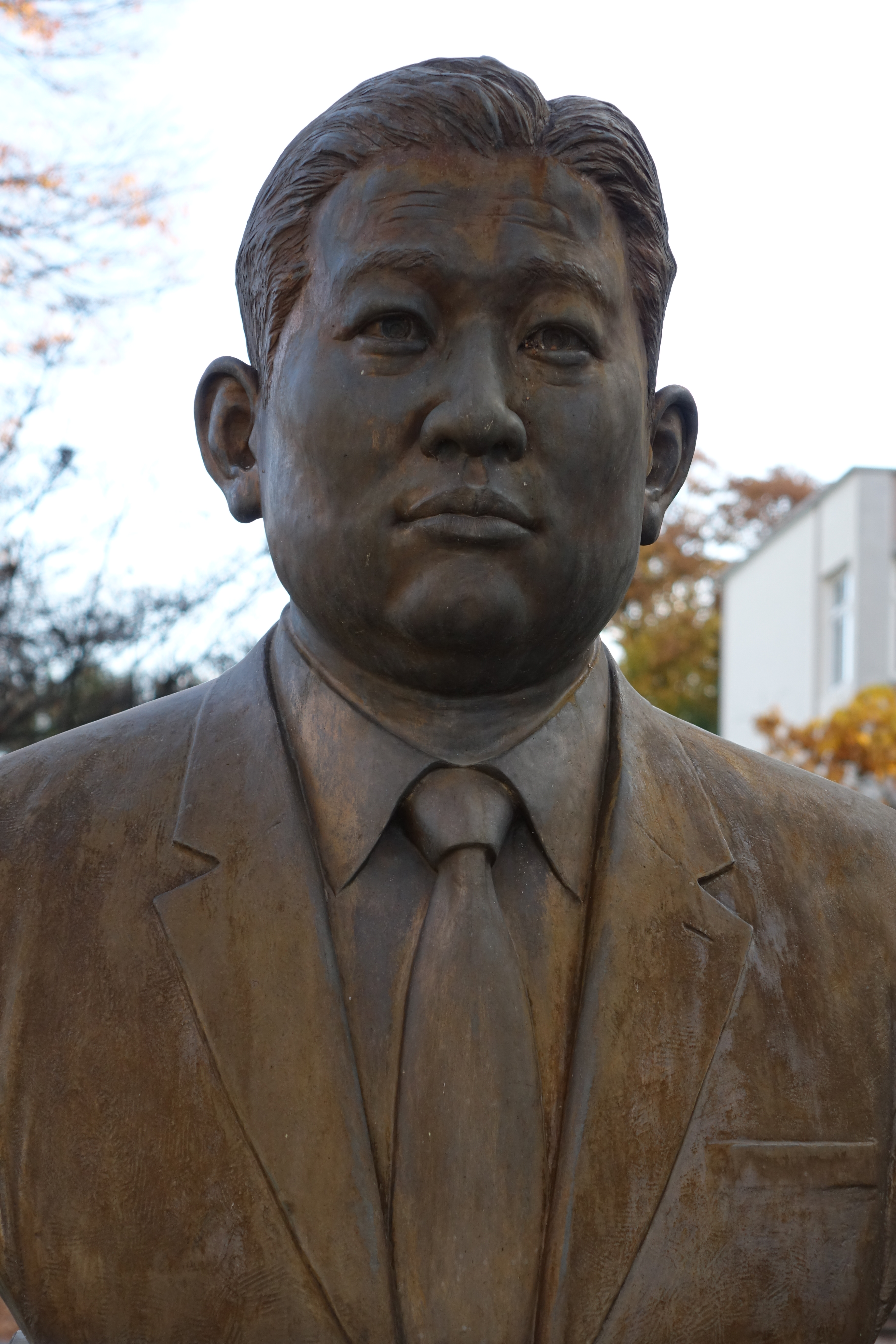 최용근